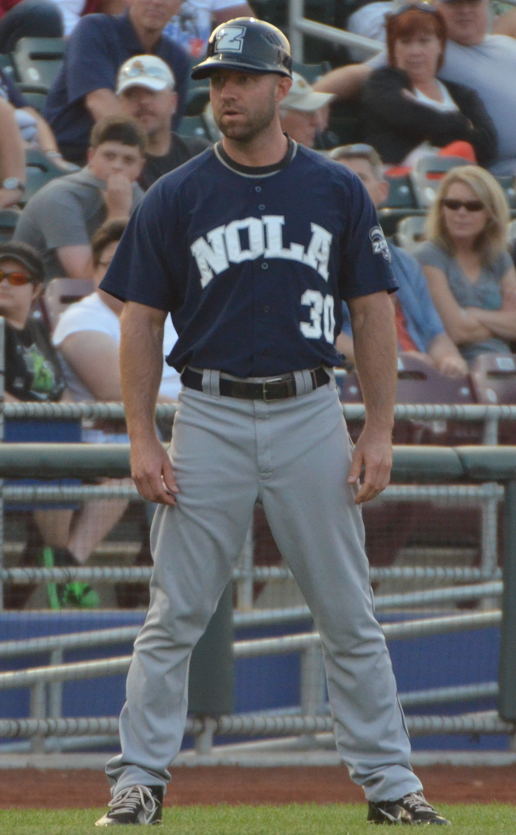 Kevin Kouzmanoff